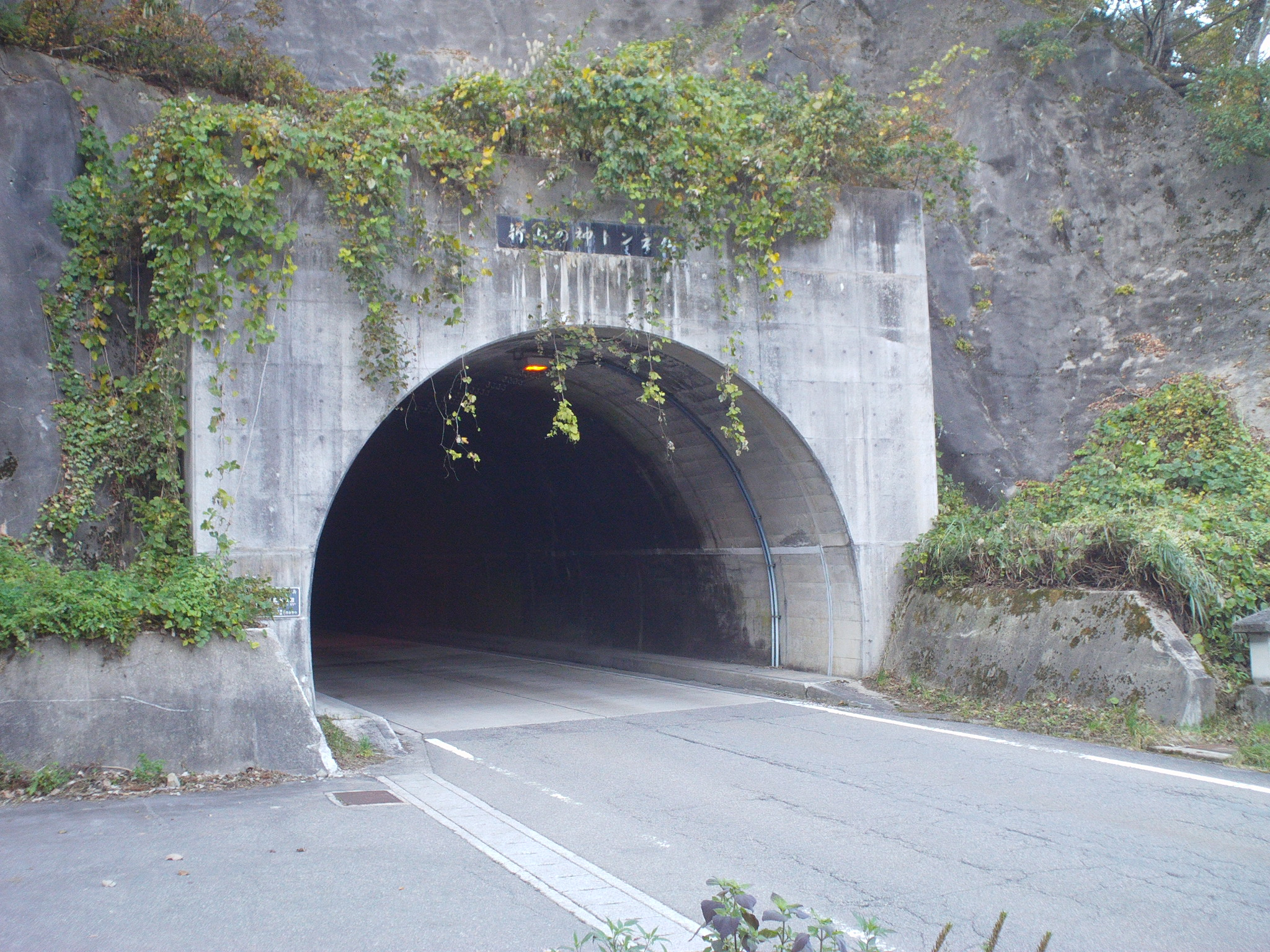 林道大山福光線、新山の神トンネル